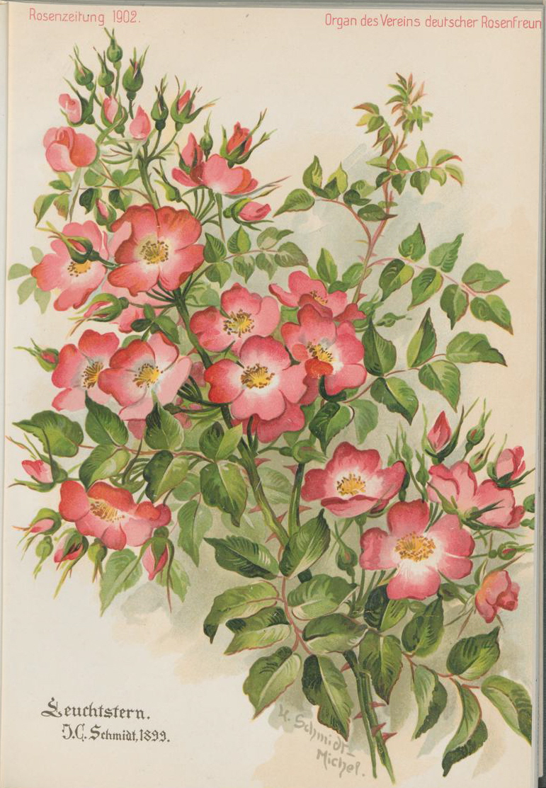 Chromolithographie parue en 1902 dans la Rosen-Zeitung, d'après une aquarelle de Helena Schmidt-Michel représentant des branches du cultivar hybride de Rosa multiflora 'Leuchtstern' (Kiese & Schmidt, 1899).